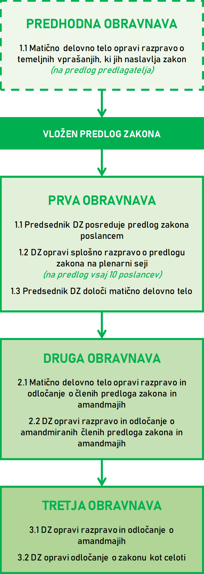 Grafična predstavitev rednega zakonodajnega postopka